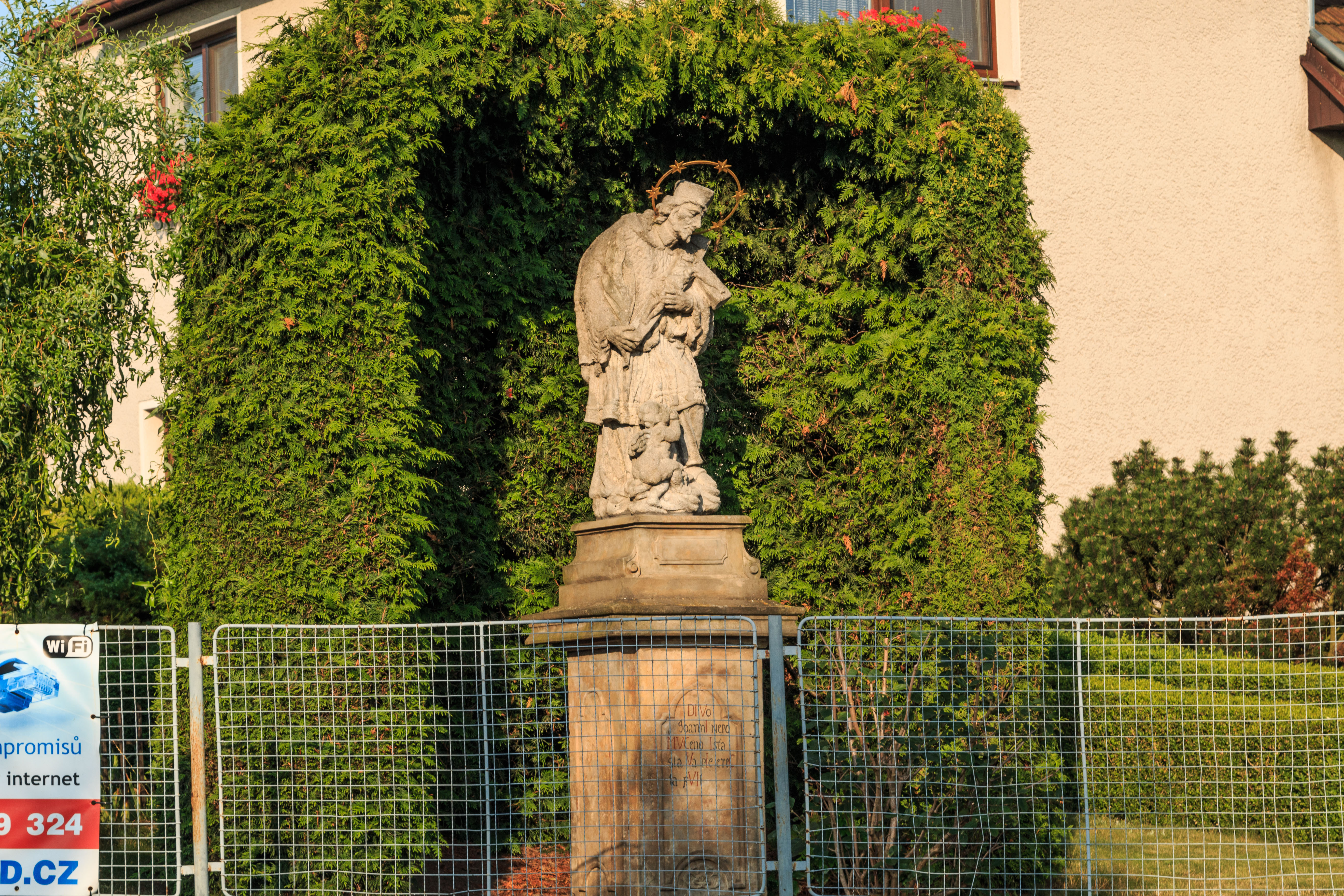 Socha svatého Jana Nepomuckého ve Smidarech při odbočce do Loučné Hory